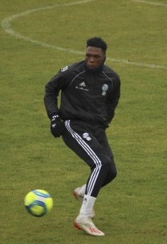 Entrainement RCS - Lebo Mothiba